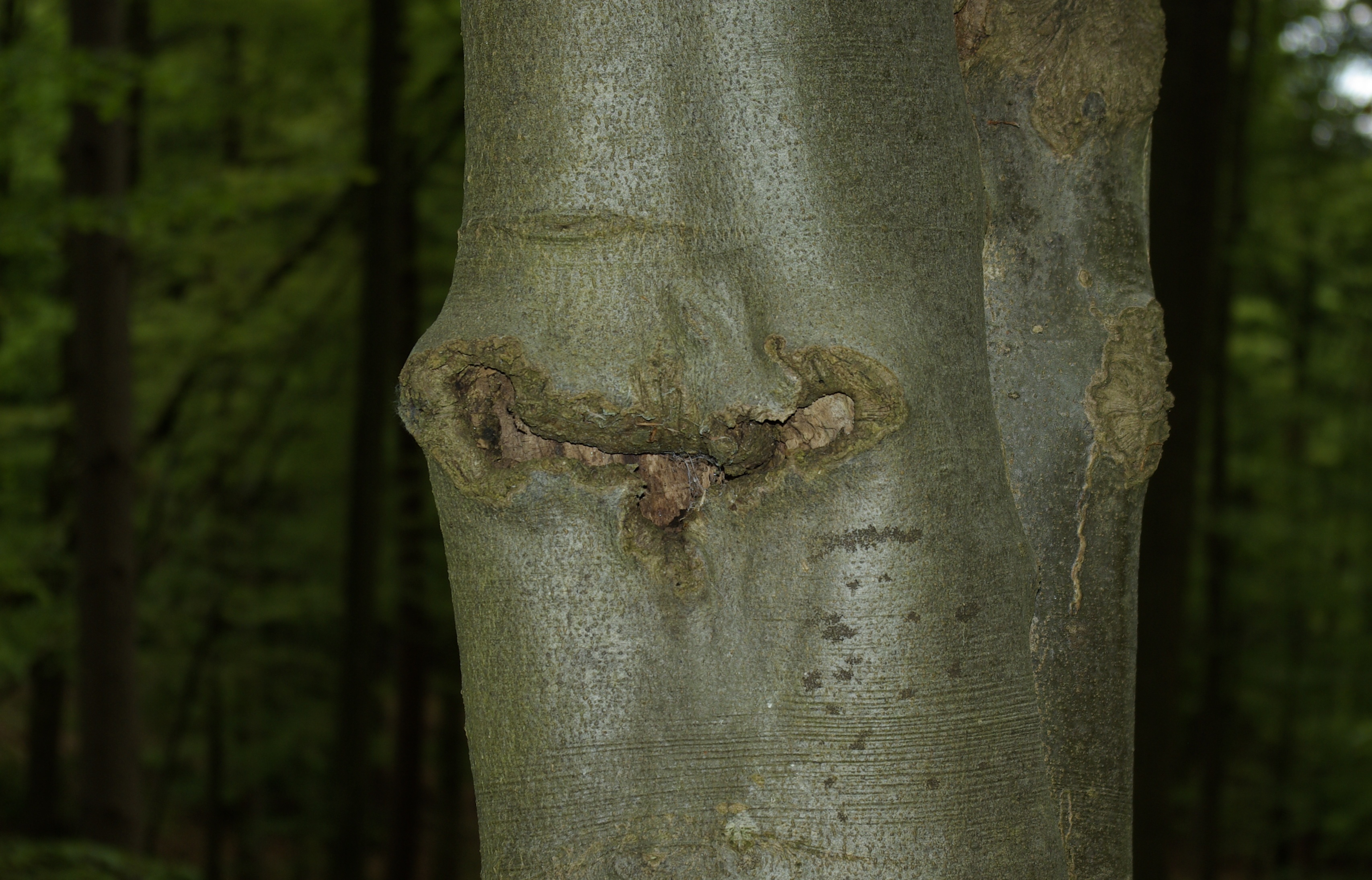 Mulmhöhle am Stamm einer Rotbuche im Geschützten Landschaftsbestandteil Der Hohe Buchene Wald im Ebracher Forst im Steigerwald